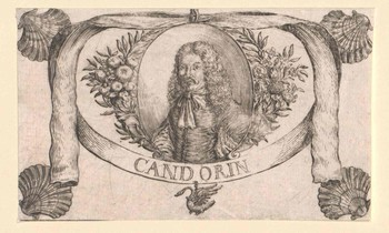 Höveln, Conrad von (Mitglied des Elbschwanenordens Hamburg; Dt. Schriftsteller und Geschichtsschreiber, lebte ab 1668 in Dänemark)